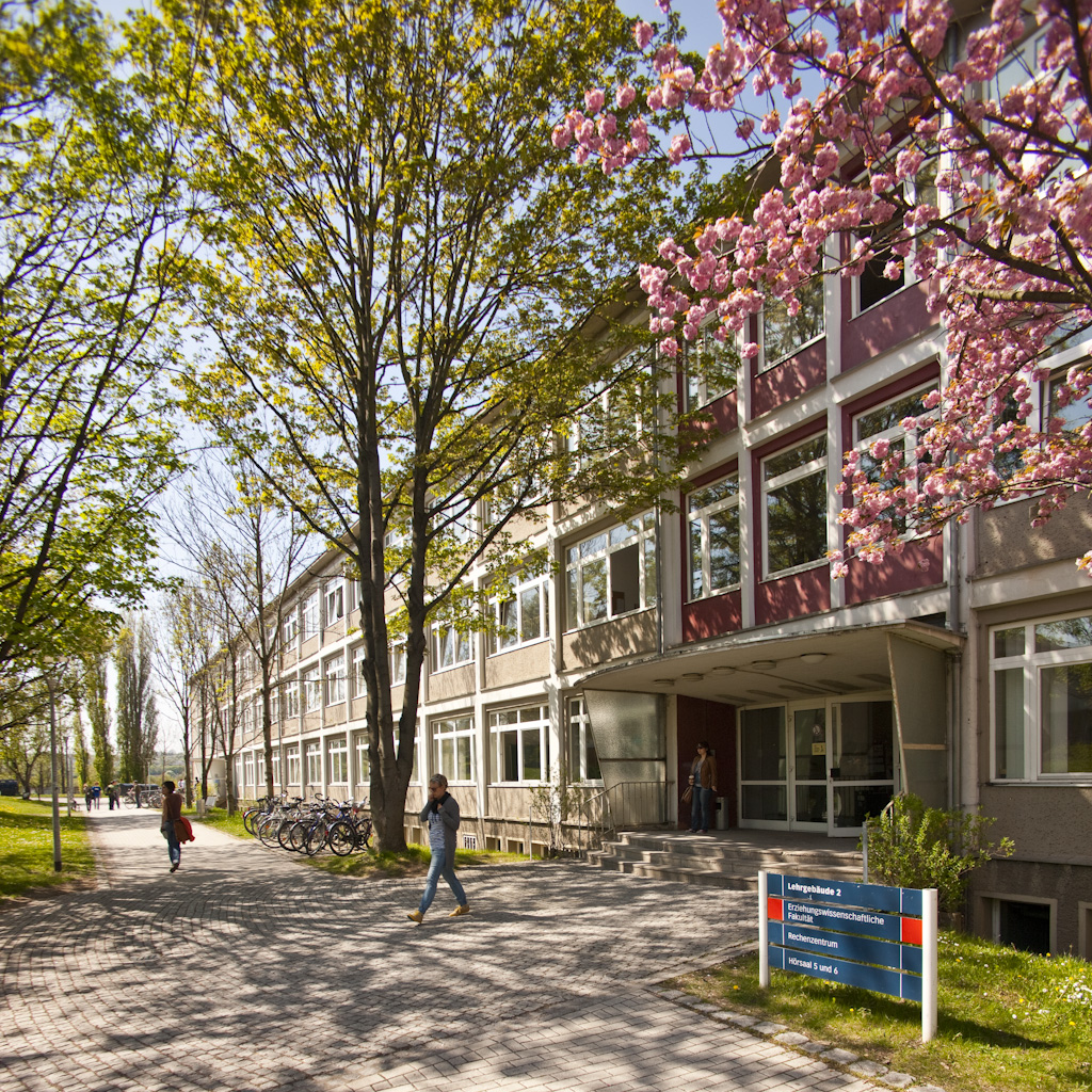 Erziehungswissenschaftliche Fakultät der Universität Erfurt